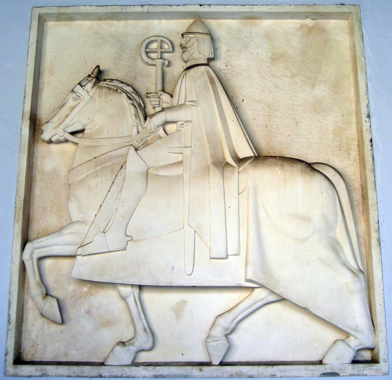 Petar Berislavić, djelo Ivana Meštrovića iz 1933. godine u Trogiru, otkrivena 1938. godine, Croatia